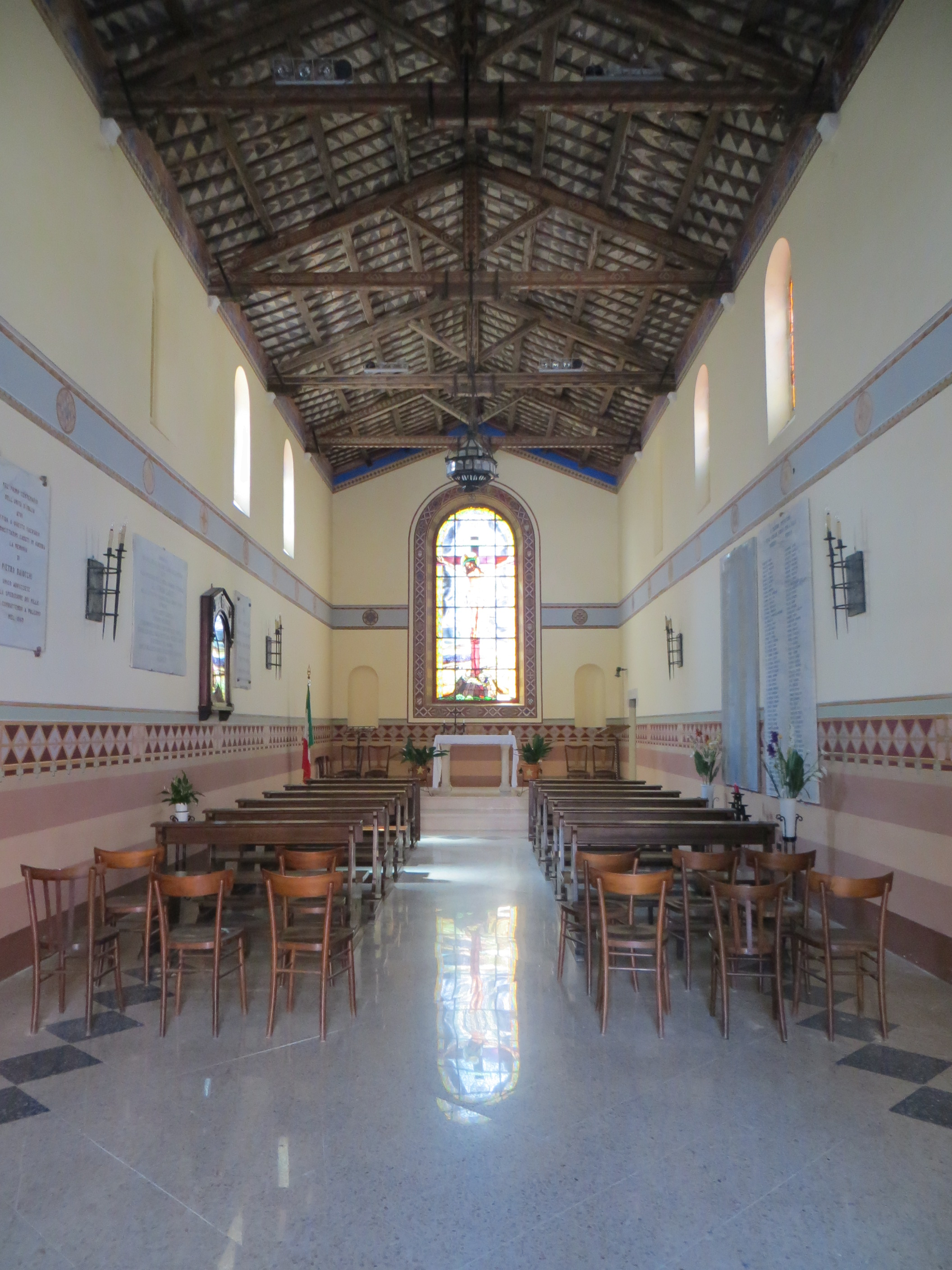 Chiesa di San Liberatore ad Atri, interno